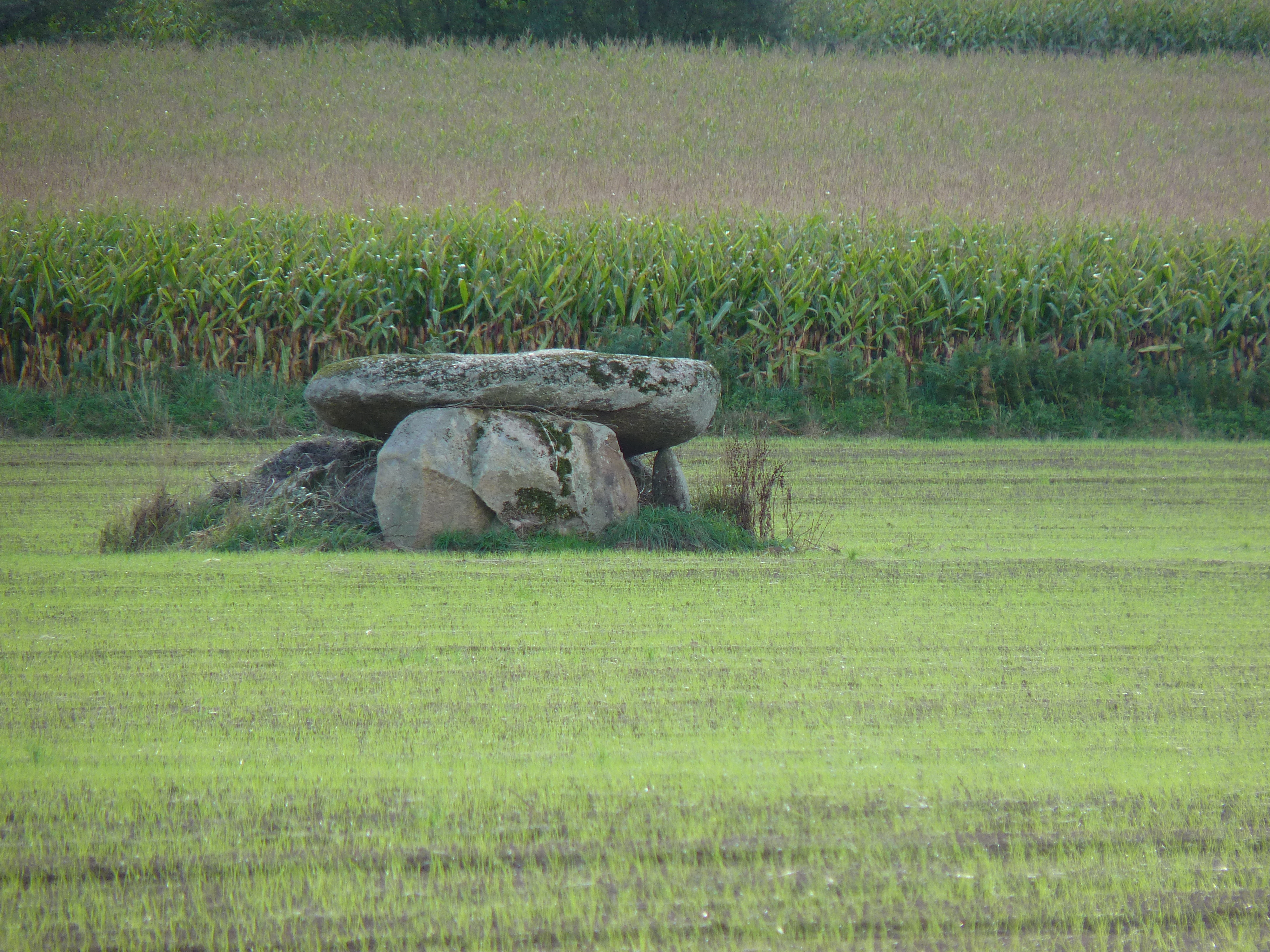 Dolmen situé dans un champ (assez loin du chemin).